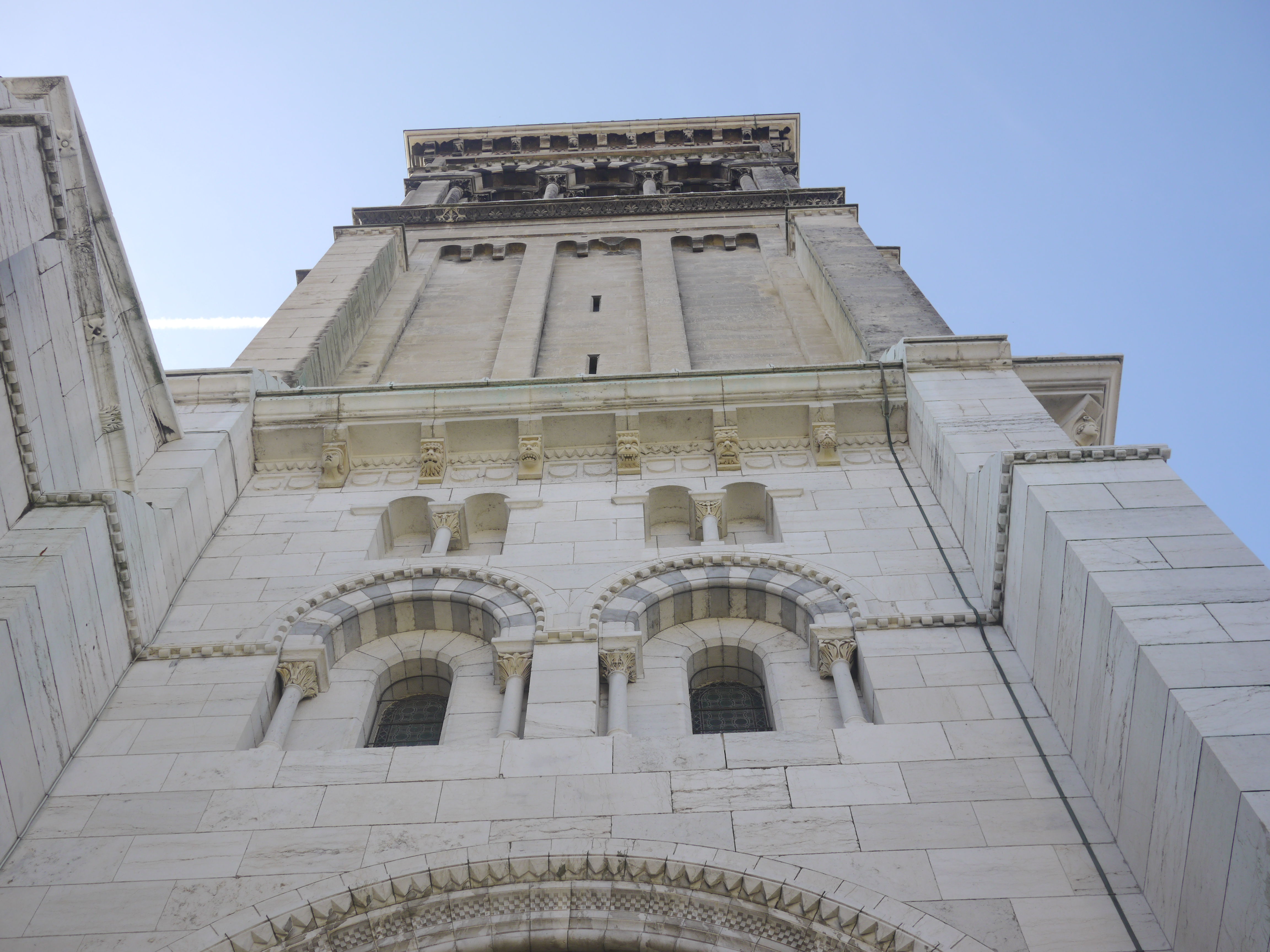 Cathédrale Saint-Apollinaire de Valence. .